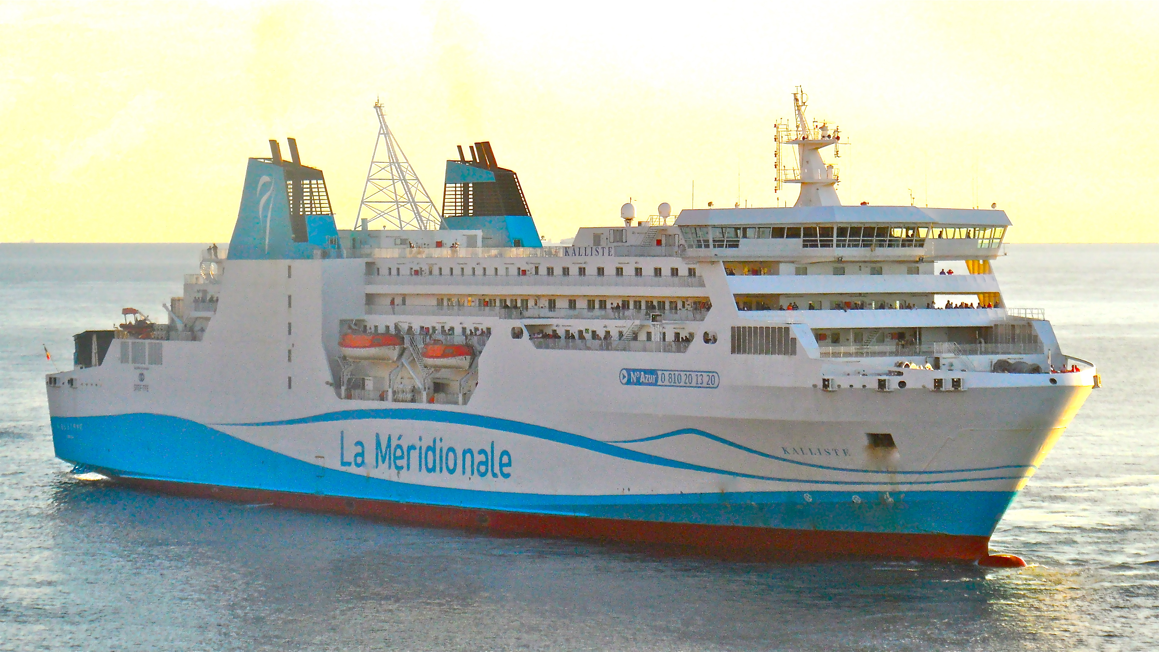 Le Kalliste à Bastia.